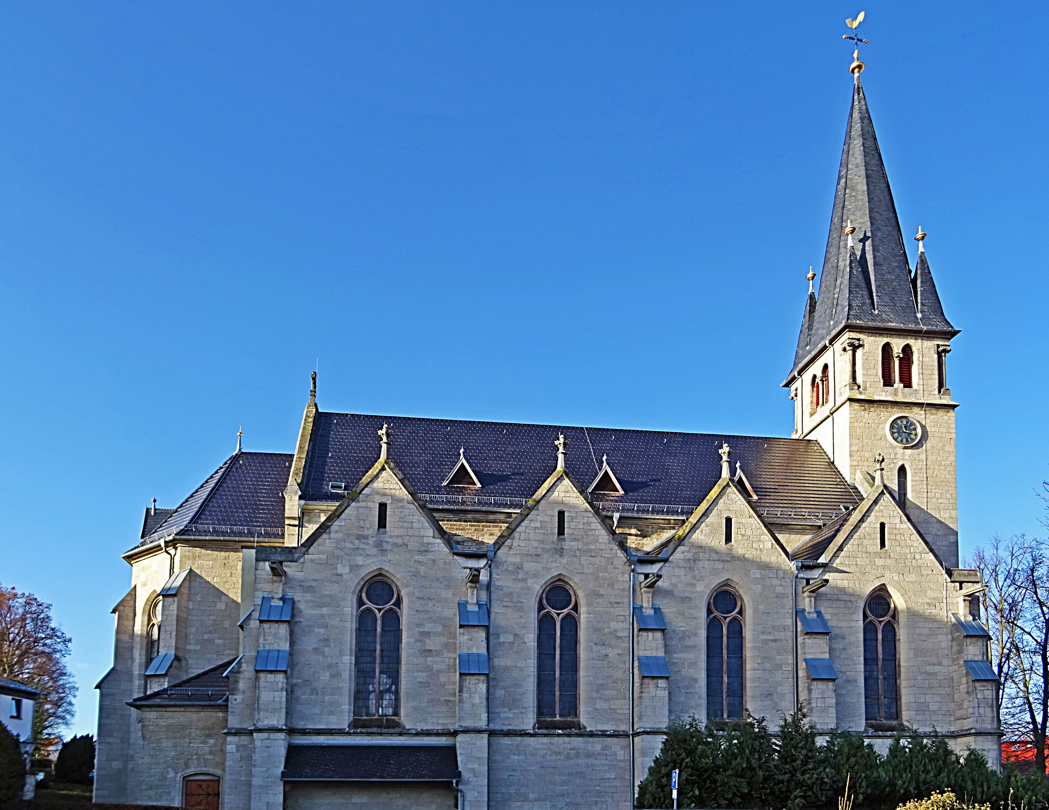 Pfarrkirche St. Maria Magdalena (Leinefelde) von Osten